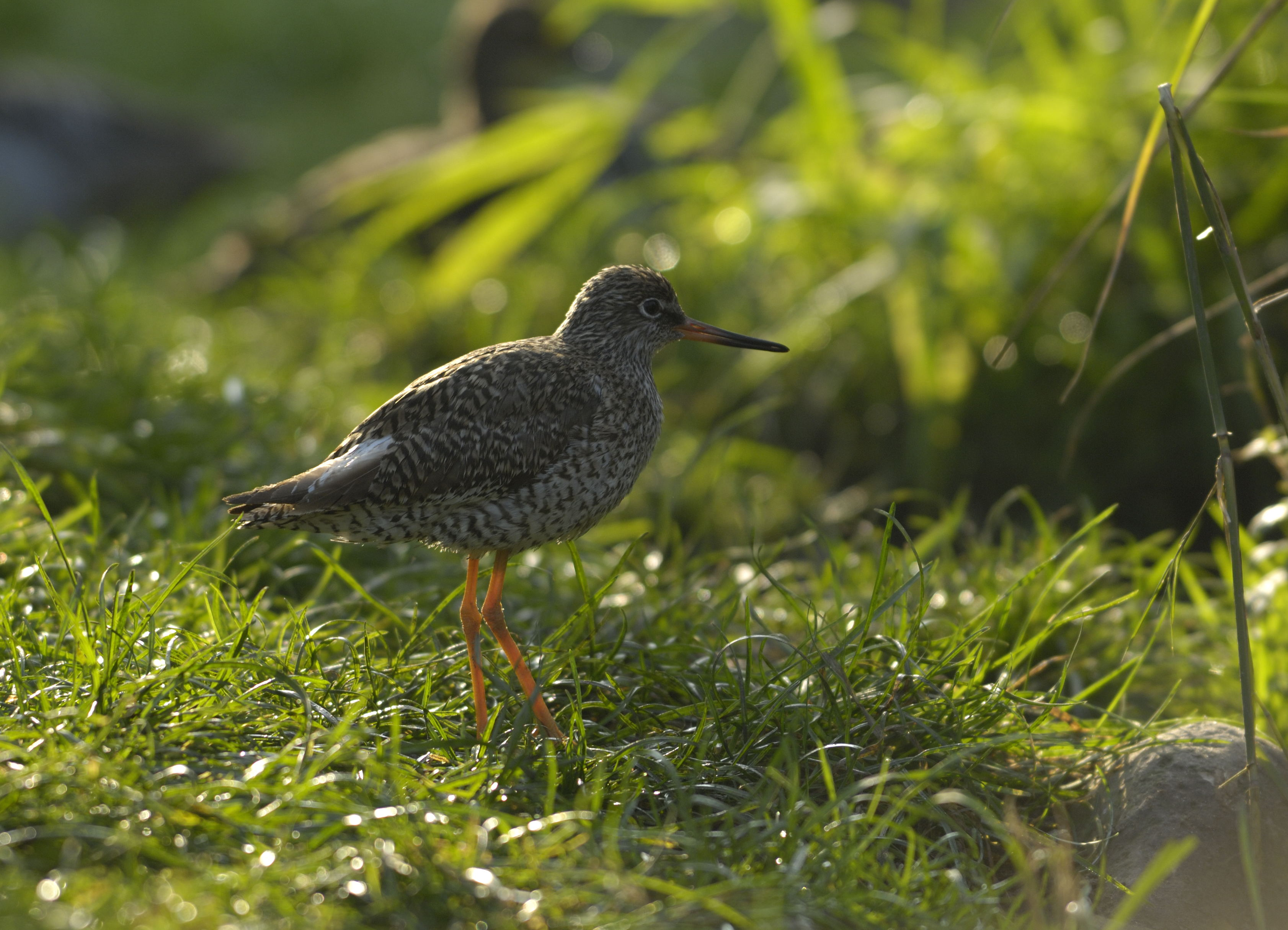 Rotschenkel (Tringa totanus) im Tiergarten Schönbrunn, Wien, Österreich